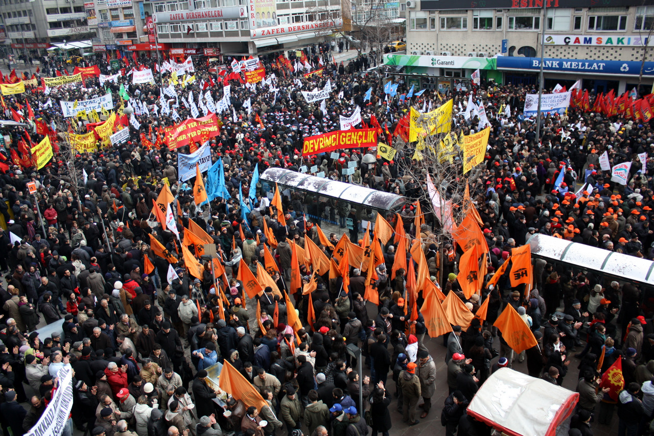 Tekel Direnişine Destek Grevi / Ankara / 4 şubat 2010